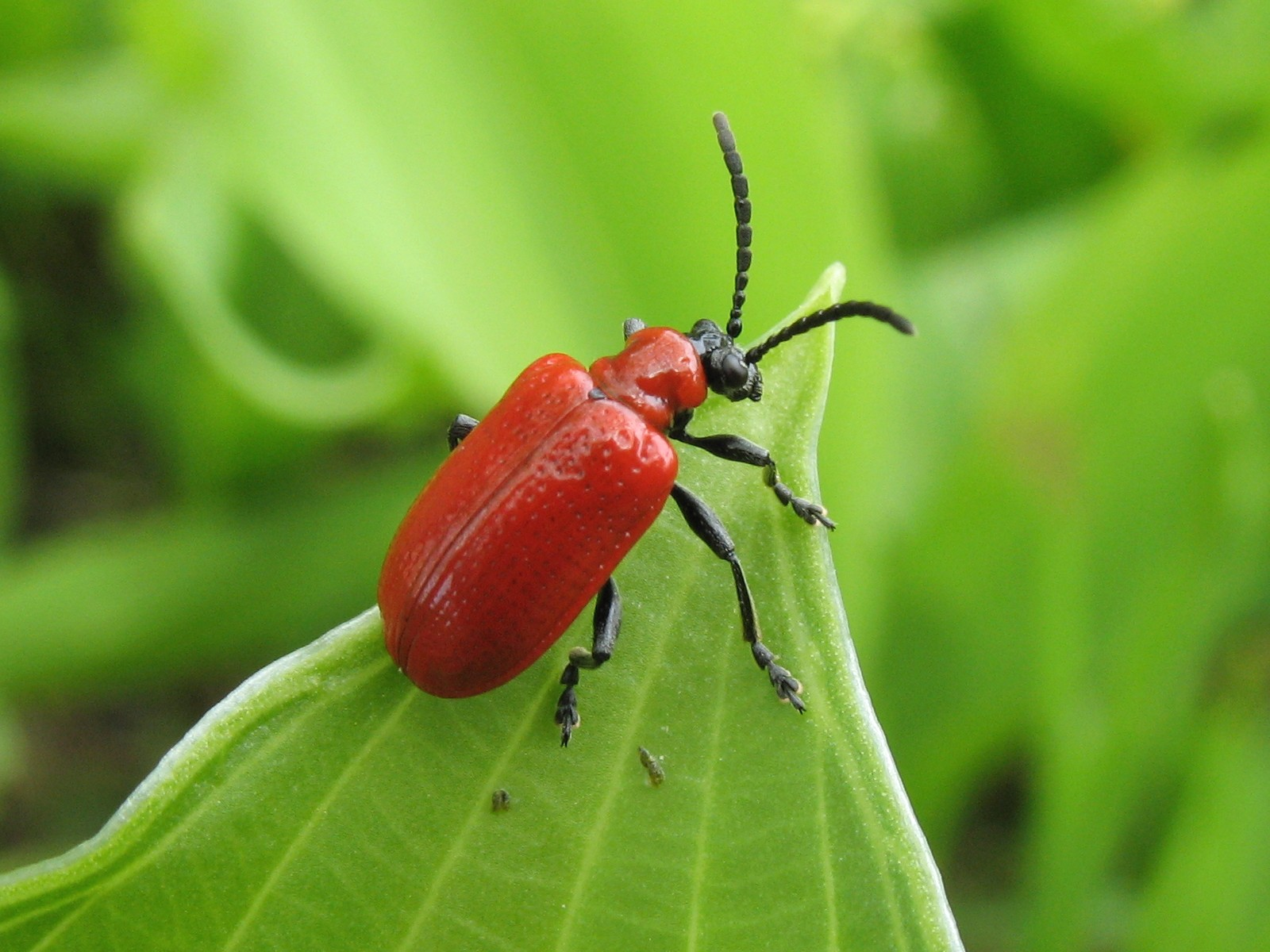 Criocère du lis -- Lily leaf beetle Order Coleoptera -- Family Chrysomelidae Bas-Saint-Laurent -- Province de Québec -- Canada Prise en juin 2008 -- Taken in June 2008